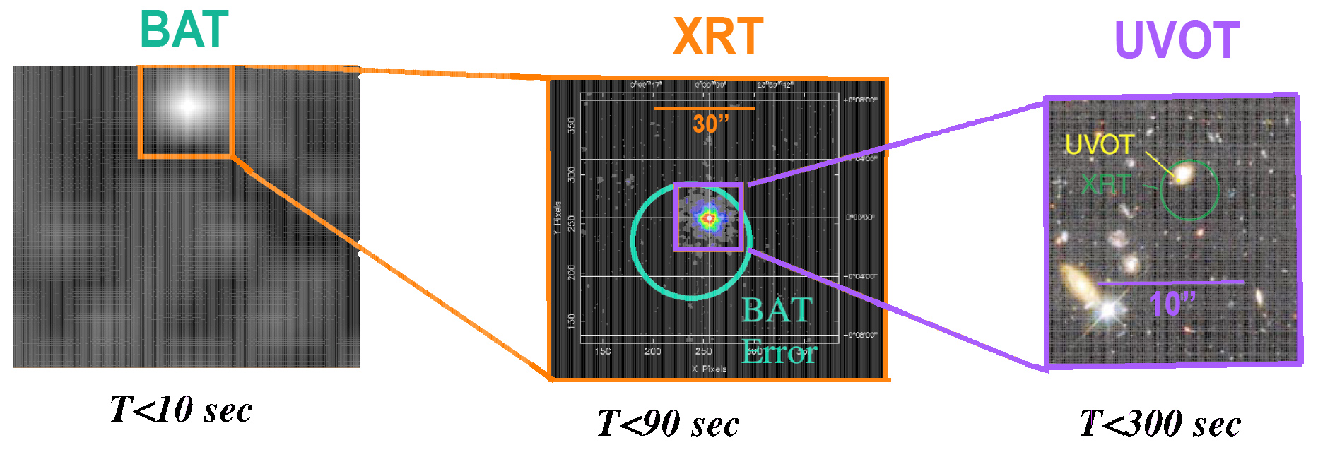 Utilisation des trois instruments de l'observatoire spatial Swift pour localiser un sursaut gamma (légendes en français)